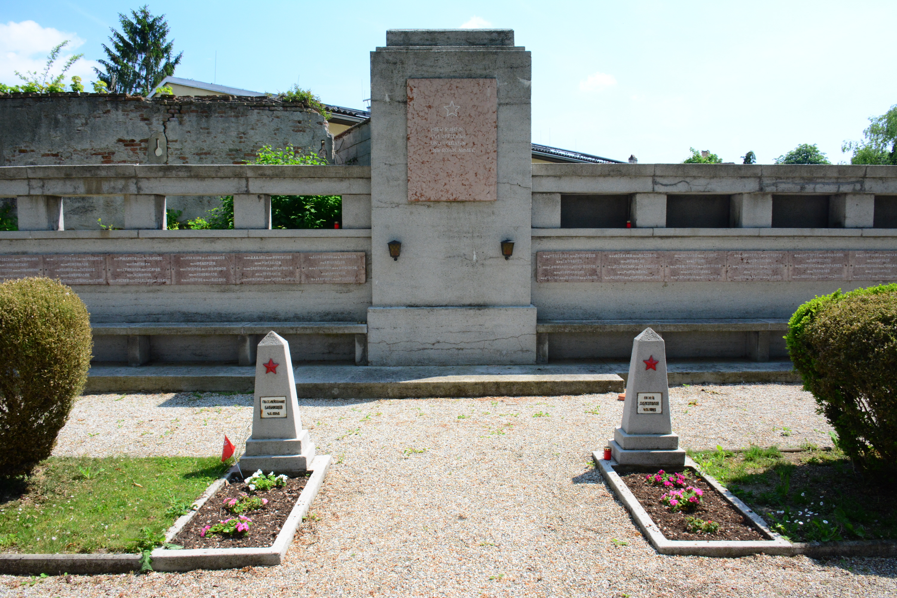 Der russische Soldatenfriedhof in Herzogenburg (Niederösterreich)